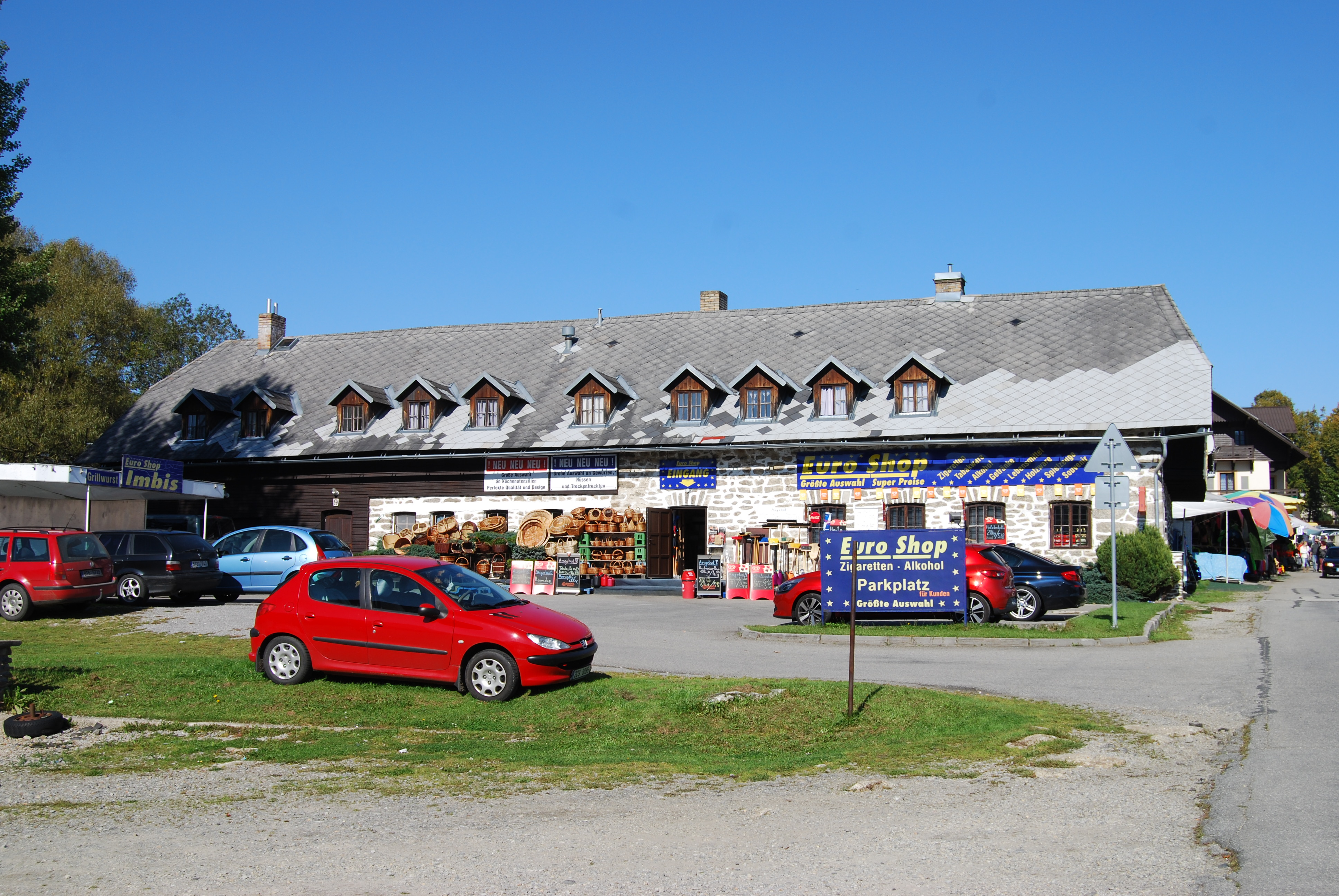 Strážný v okrese Prachatice v Jihočeském kraji. Česká republika. - Google Maps - Google Earth